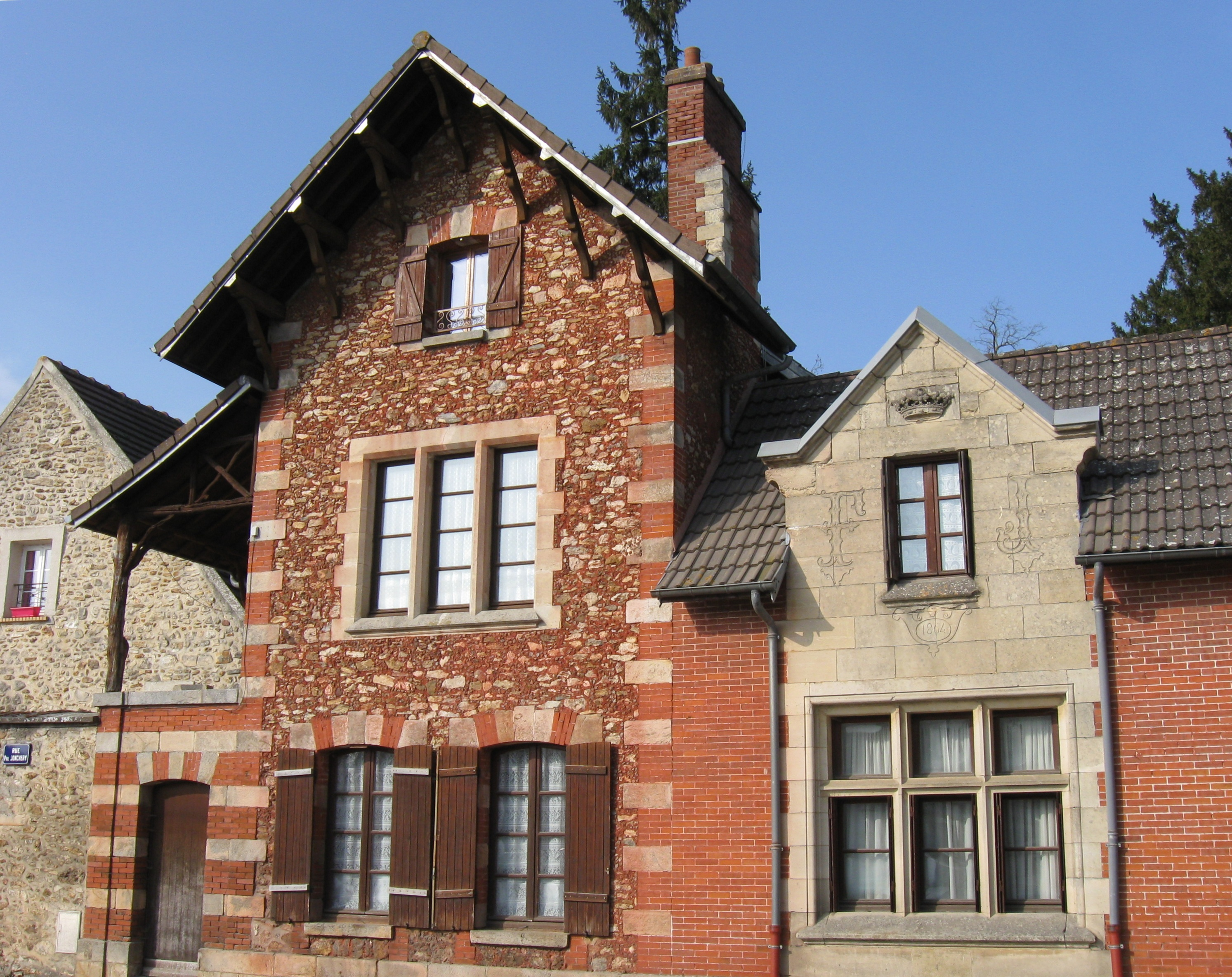 Pavillon de garde du château de Presles à Presles-en-Brie. (Seine-et-Marne, région Île-de-France).